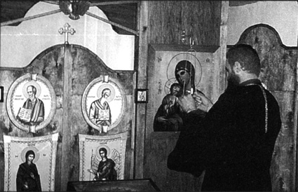 Lugansk Ukraine